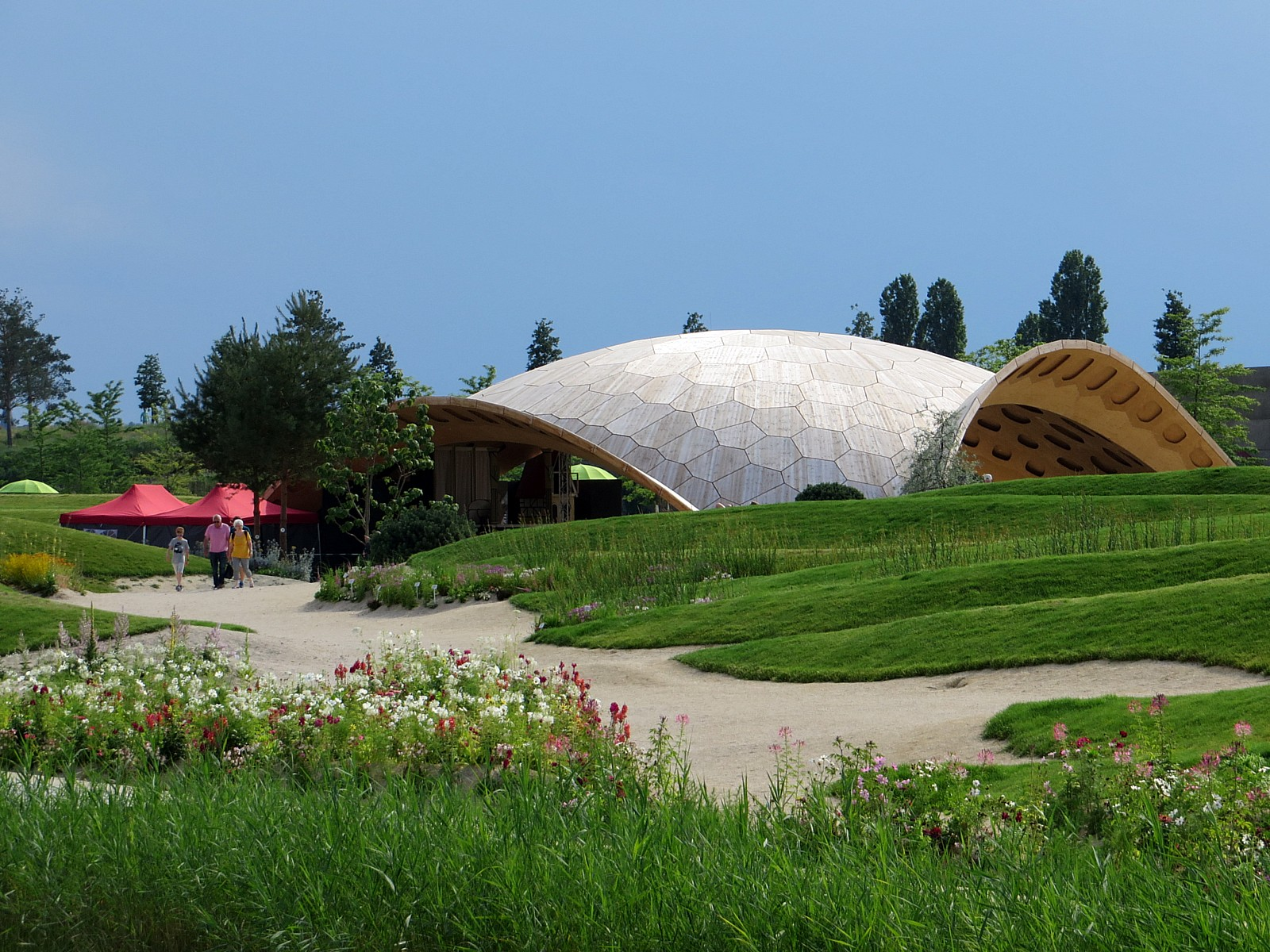 Bundesgartenschau 2019 Heilbronn - Bionischer Holzpavillon - Holz & Innovation: Mutter Natur baut mit - Partner: Universität Stuttgart und das Land Baden-Württemberg - Planer und Ausführer: Universität Stuttgart, ICD und ITKE / Fa. Müller Blaustein Holzbau / BIB Kutz GmbH & Co KG